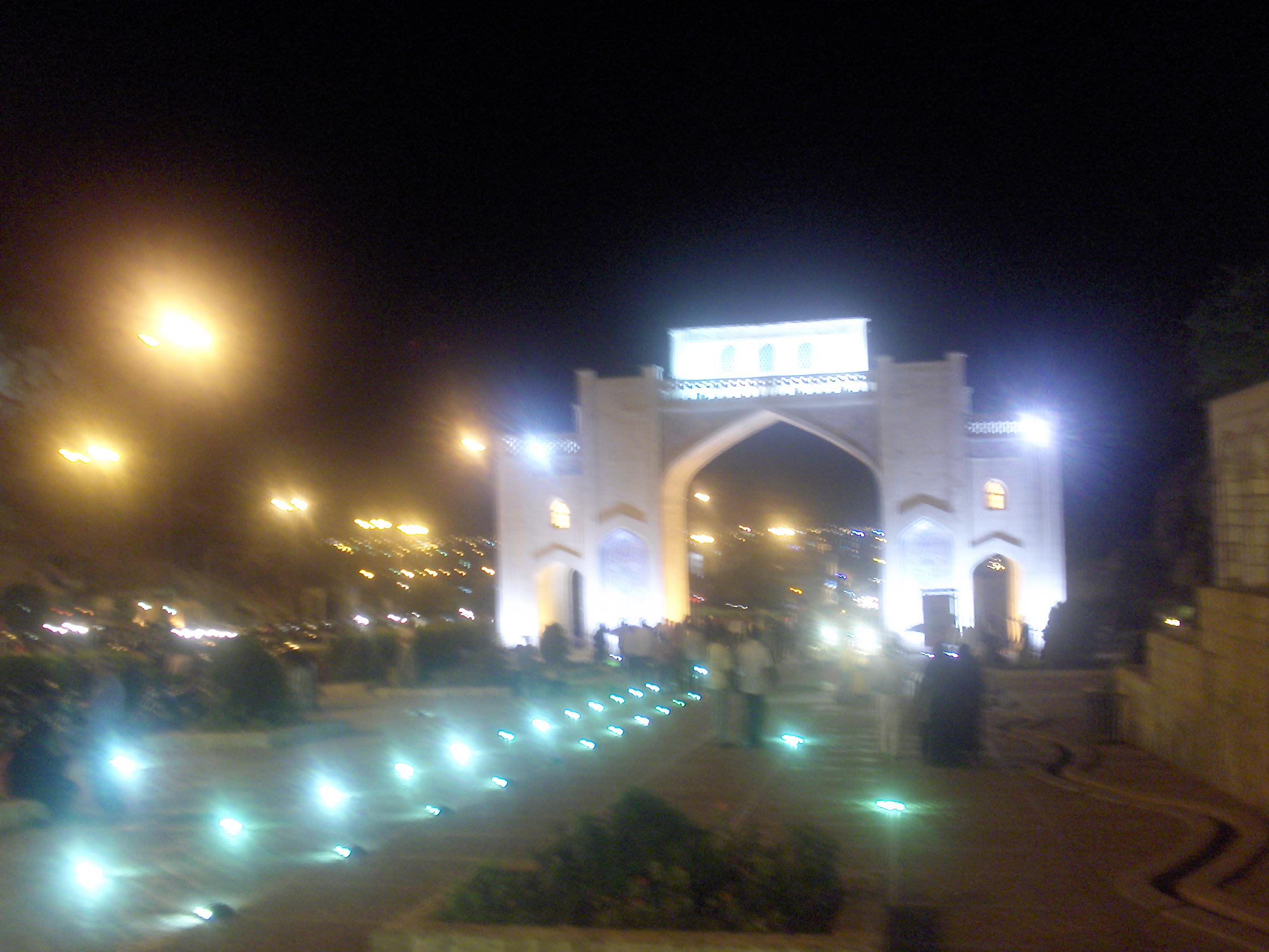 Darvazeh Qor'an (Koran Gate), Shiraz, Persia (Iran), taken by Pejman Akbarzadeh, 2006.